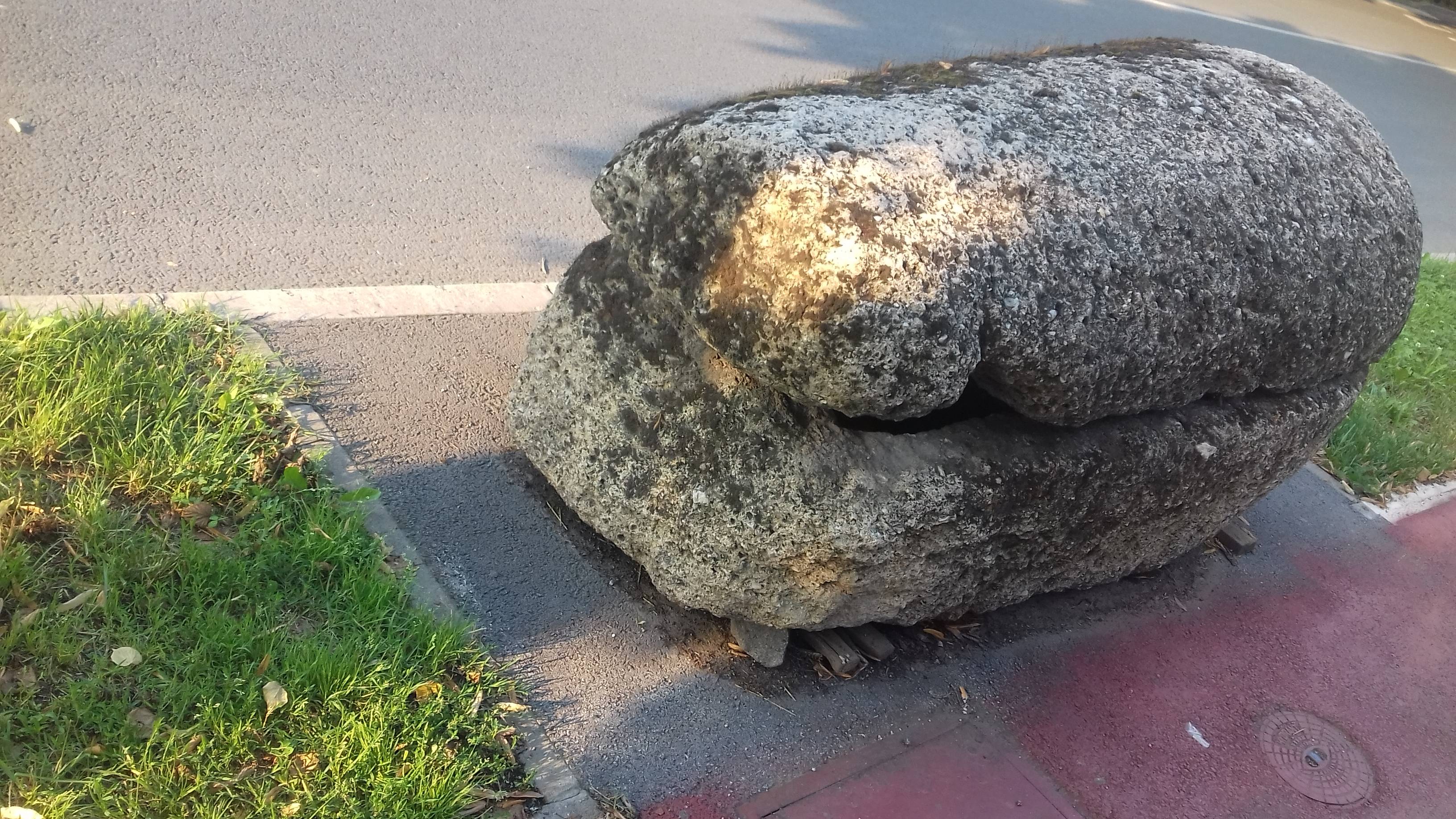 Зеница